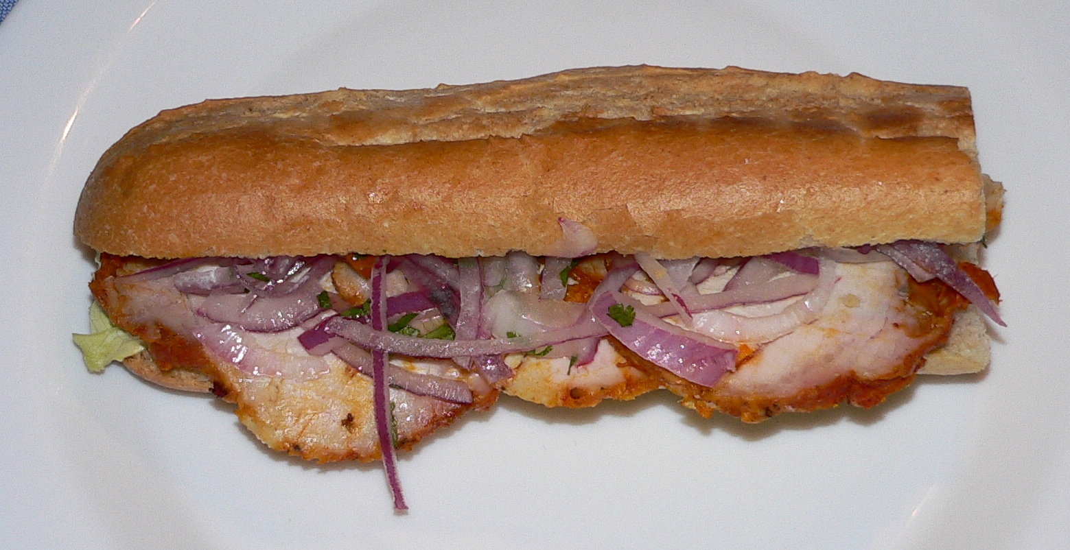 Descripción: Gastronomía del Perú Nombre: Butifarra del Perú País : Perú Fotógrafo: © Manuel González Olaechea y Franco Fecha : 11 de Noviembre de 2007